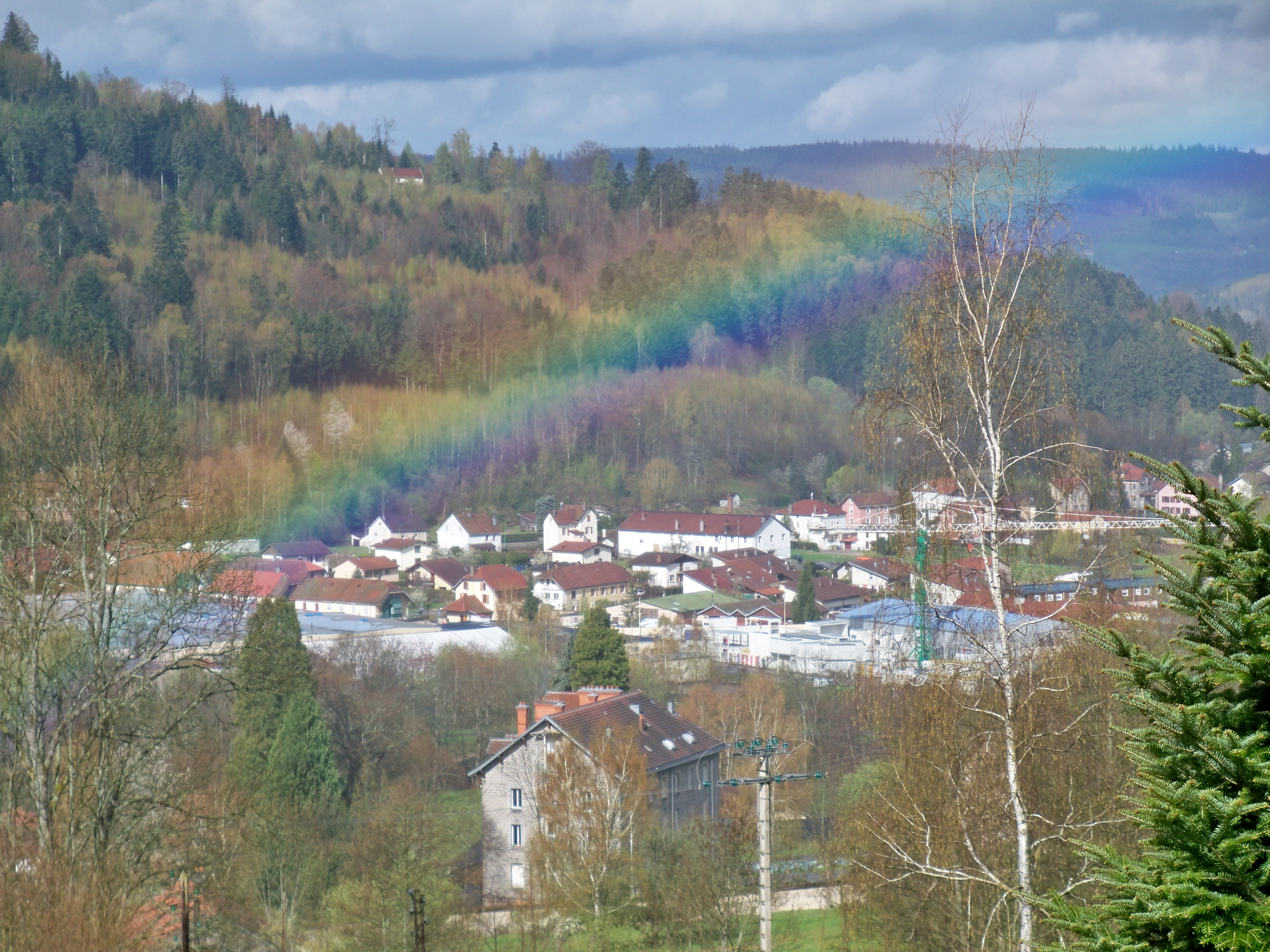 Vue de la commune de Plainfaing, dans les Vosges, avec Arc-en-ciel